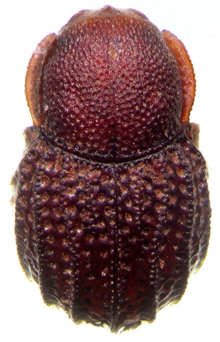 Foto de Syncosmetus japonicus (Coleoptera: Ciidae: Xylographellini). Fotografado por mim (Cristiano Lopes-Andrade) em 2007, para a sinopse da tribo Xylographellini.